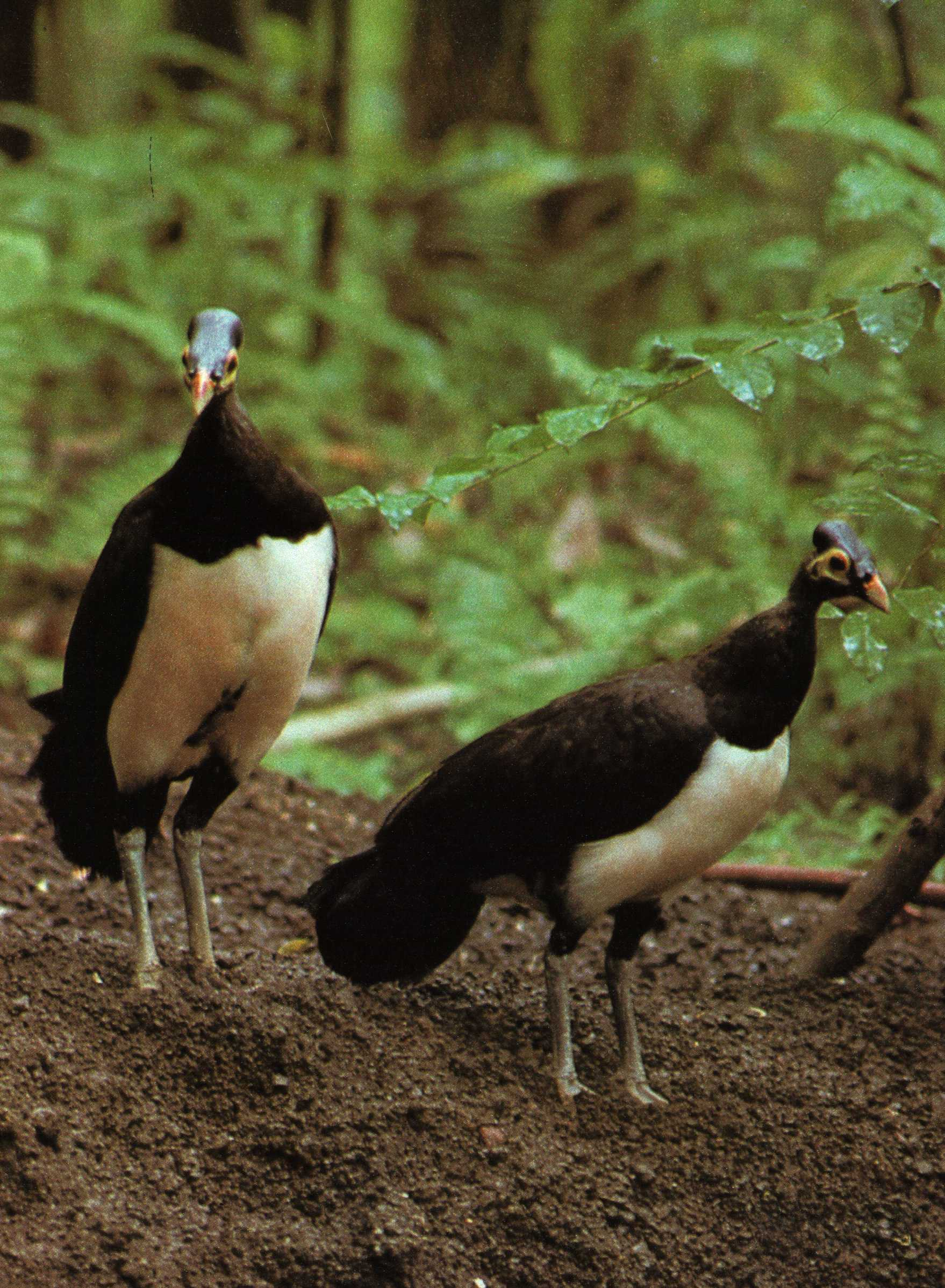 Kalapácsfejű tyúk (Macrocephalon maleo), Celebesz, Indonézia